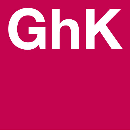 Ursprüngliches Logo der Gesamthochschule Kassel bis zum Jahr 2000, seither Universität Kassel